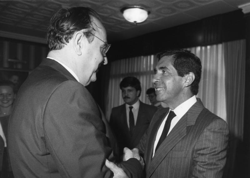 San José, 9. April 1987 Am 7. April 1987 startete der Bundesminister des Auswärtigen, Hans-Dietrich Genscher, zu einer Reise nach Mittelamerika. Vom 7. bis 9.4. besuchte er Venezuela und vom 9. bis 13.4. die Republik Costa Rica. Letzte Station seiner Reise war El Salvador. Am 14. April kehrte Bundesaußenminister Genscher nach Bonn zurück. Der Präsident der Republik Costa Rica, Dr. Oscar Arias Sanchez (r.), begrüßt Bundesaußenminister Genscher im Präsidialamt.